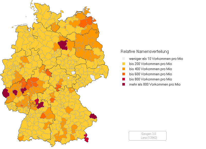 Relative Häufigkeit des Familiennamens Lenz in Deutschland